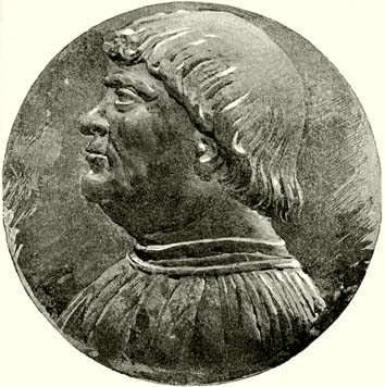 A M. N. Múzeumban őrzött érméről (háromszoros nagyítás után) Cserna Károly festőművész rajzolta Bakócz Tamásról